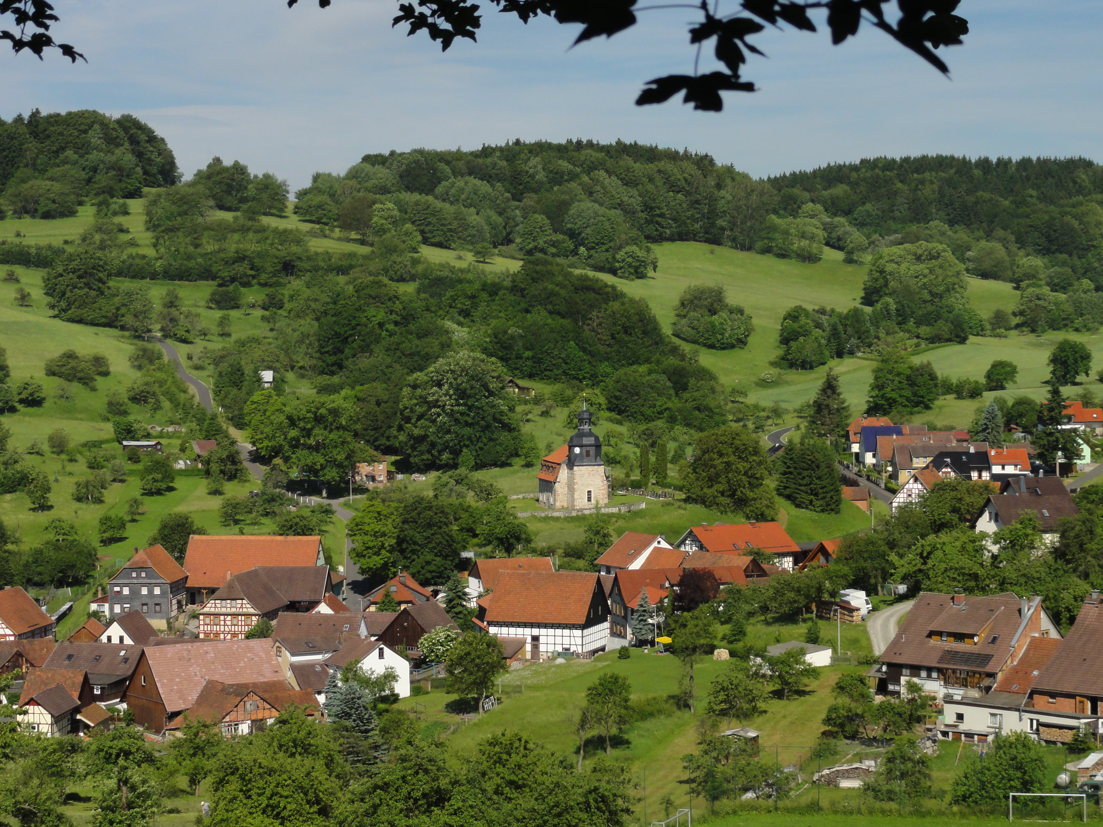 Ansicht von Eichenberg